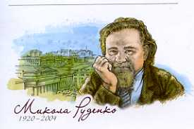 Почтовый конверт к 90-й годовщине со дня рождения Николая Руденко. Укрпочта.2010